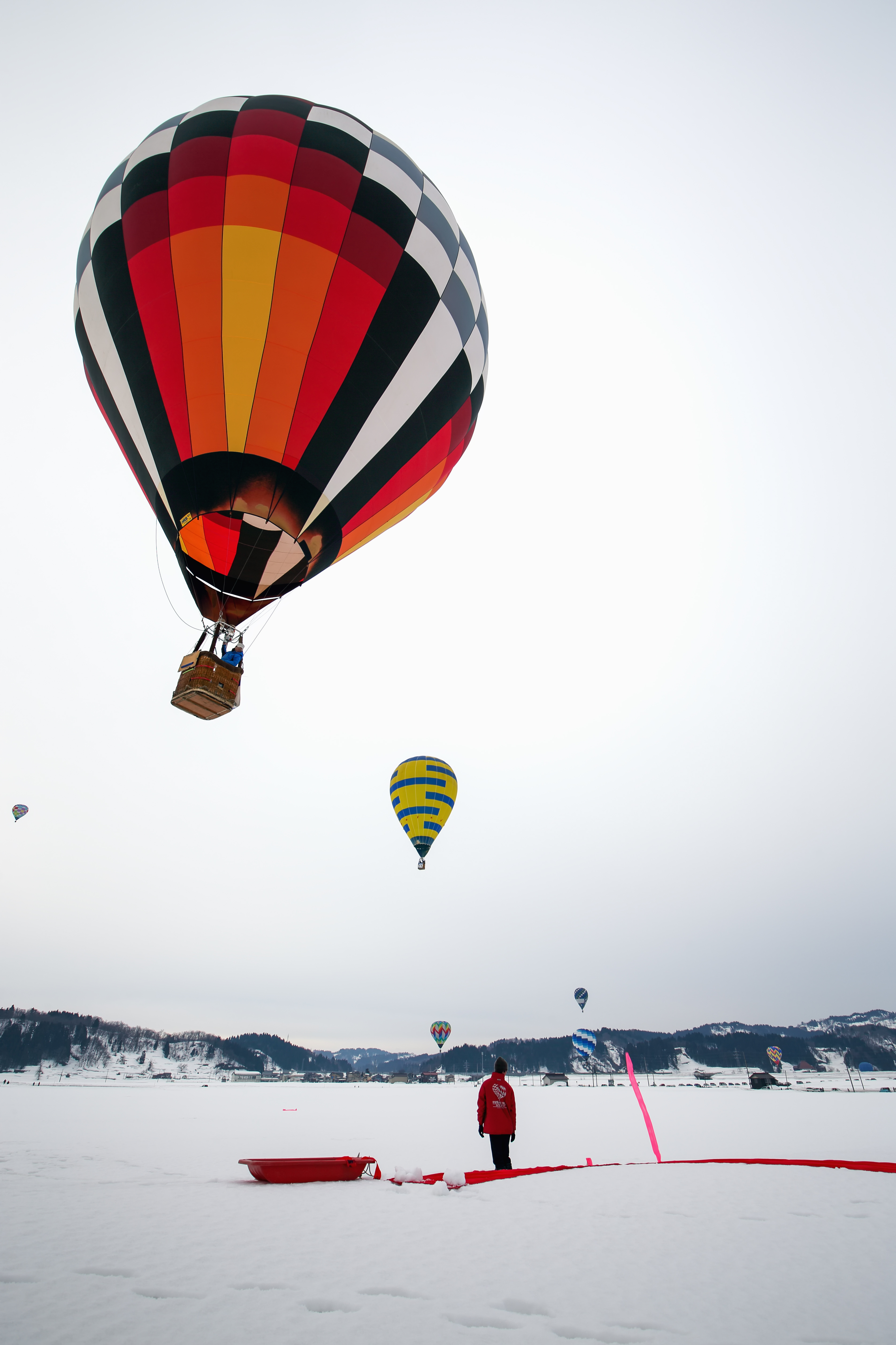 2015年に実施された、日本海カップ・クロスカントリー選手権（おぢや風船一揆）でのタスクの状況。 競技者は設定されたターゲットに向けて、マーカー（桃色の帯に見えるもの）を投下する。